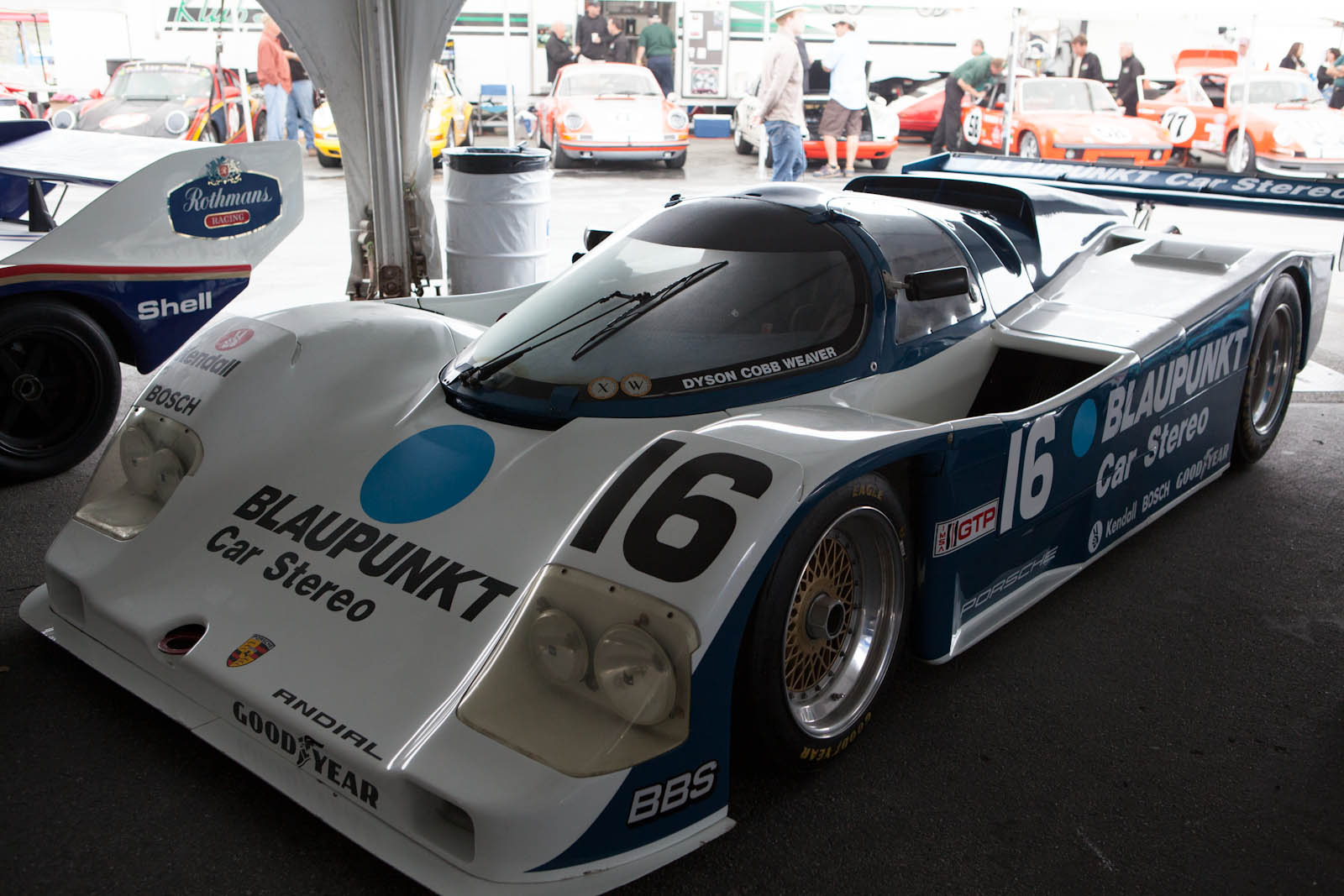 Porsche Rennsport Reunion IV